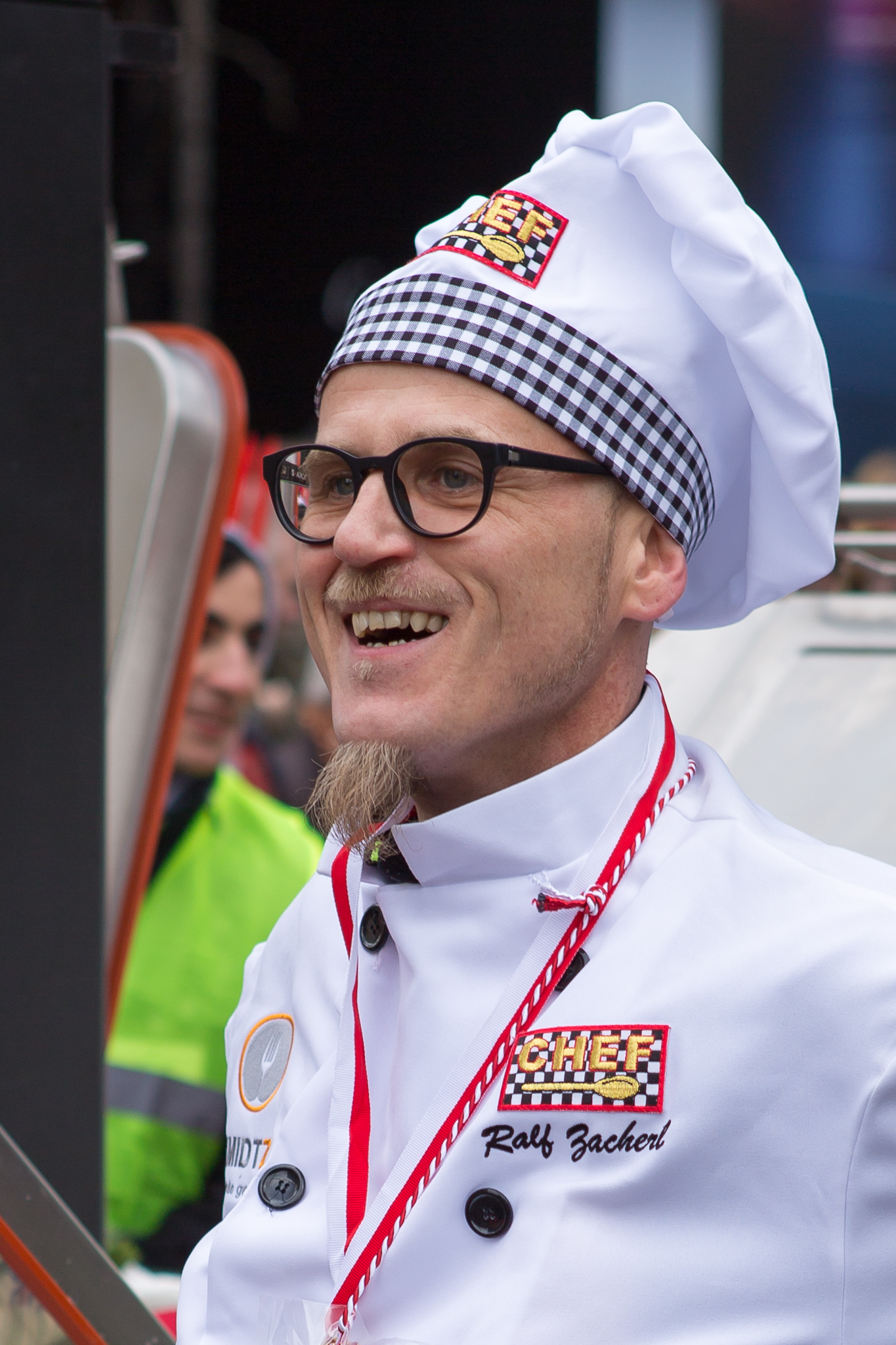 Ralf Zacherl beim Berliner Karneval, 31.01.2016